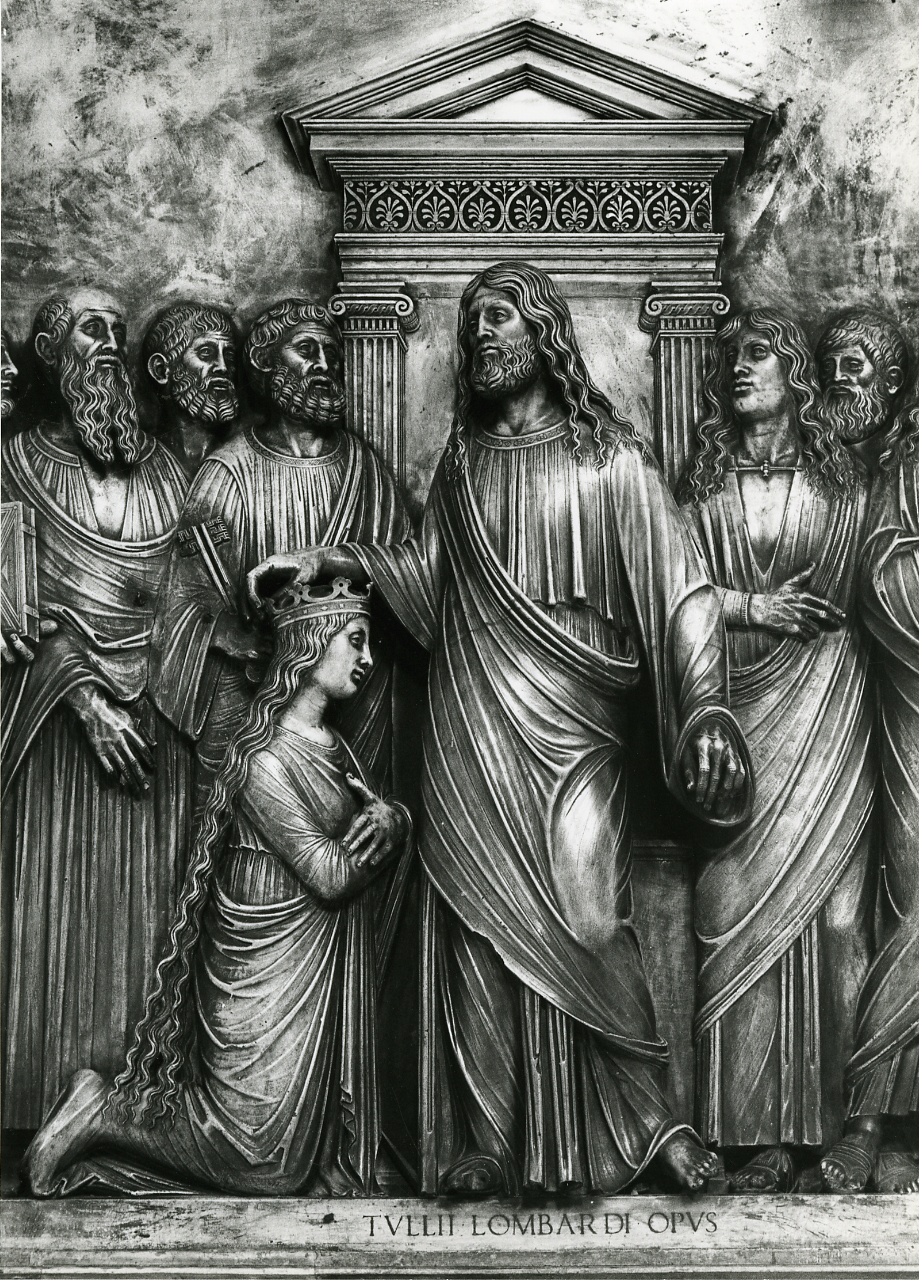 Servizio fotografico : Venezia, 1977 / Paolo Monti. - Stampe: 3 : Positivo b/n, gelatina bromuro d'argento/ carta, 24x30. - ((La suddetta serie è contenuta nella scatola identificata con la numerazione 110.